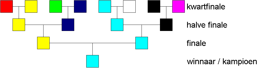 Schematische weergave finale. Zelfgemaakte tekening.